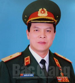 Thiếu tướng Nguyễn Đức Cường